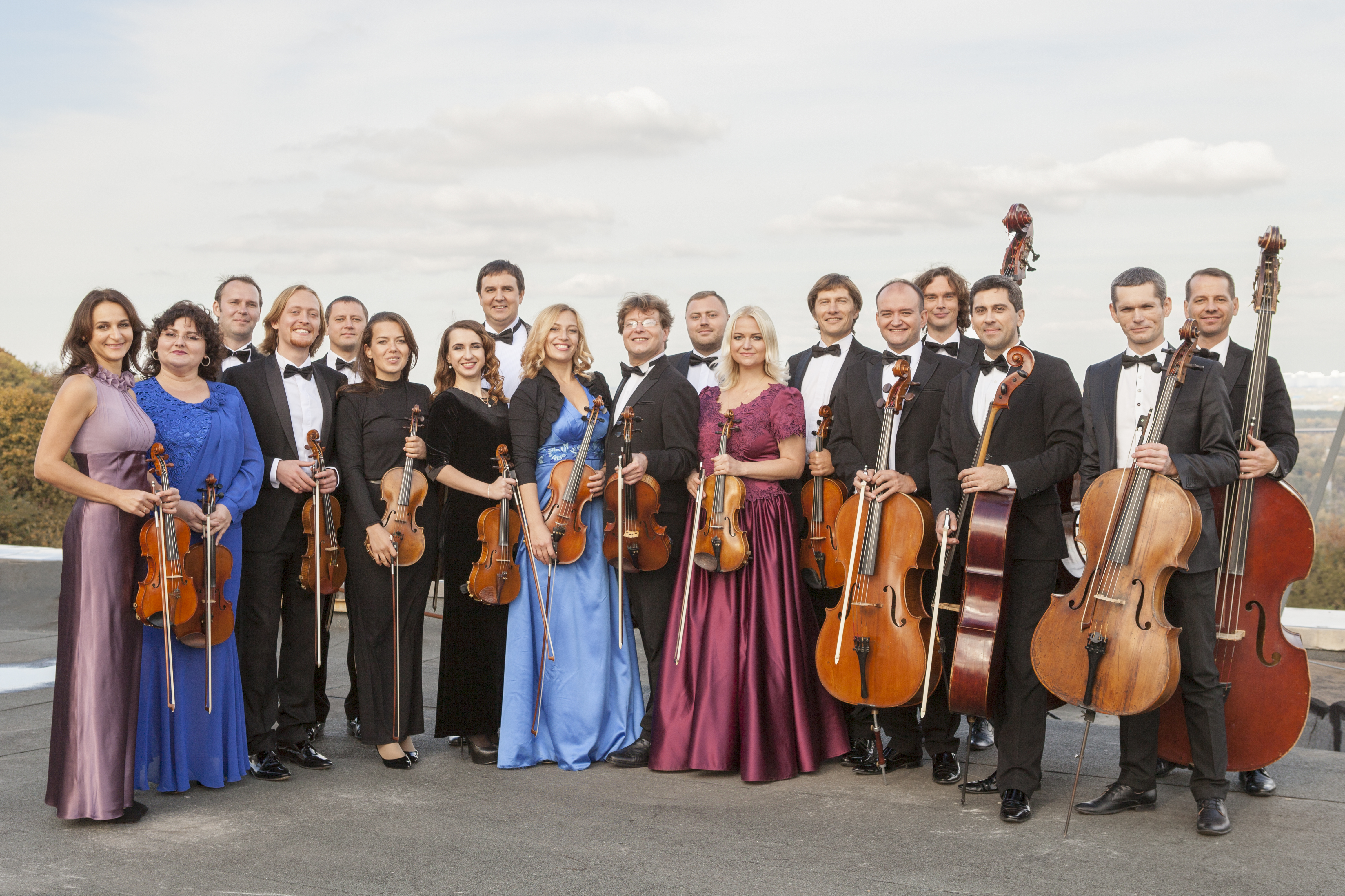 Осінь в Києві, 2016